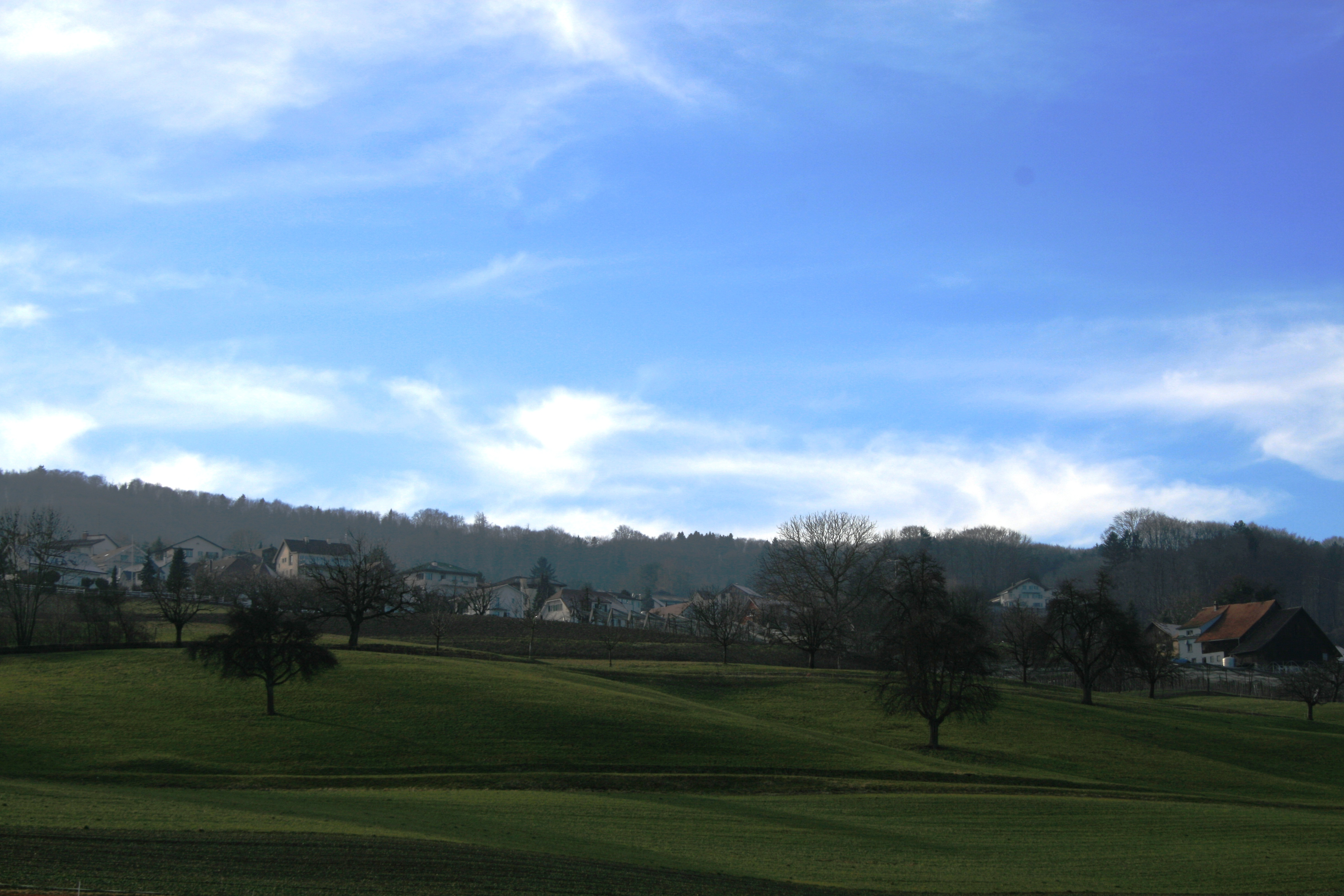 Bergdietikon AG